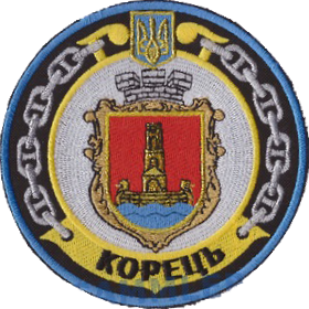 Нарукавний знак, (U830) Корець